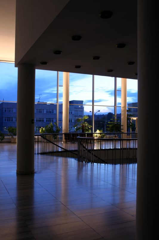 Zlínské divadlo má po setmění výjimečnou atmosféru.